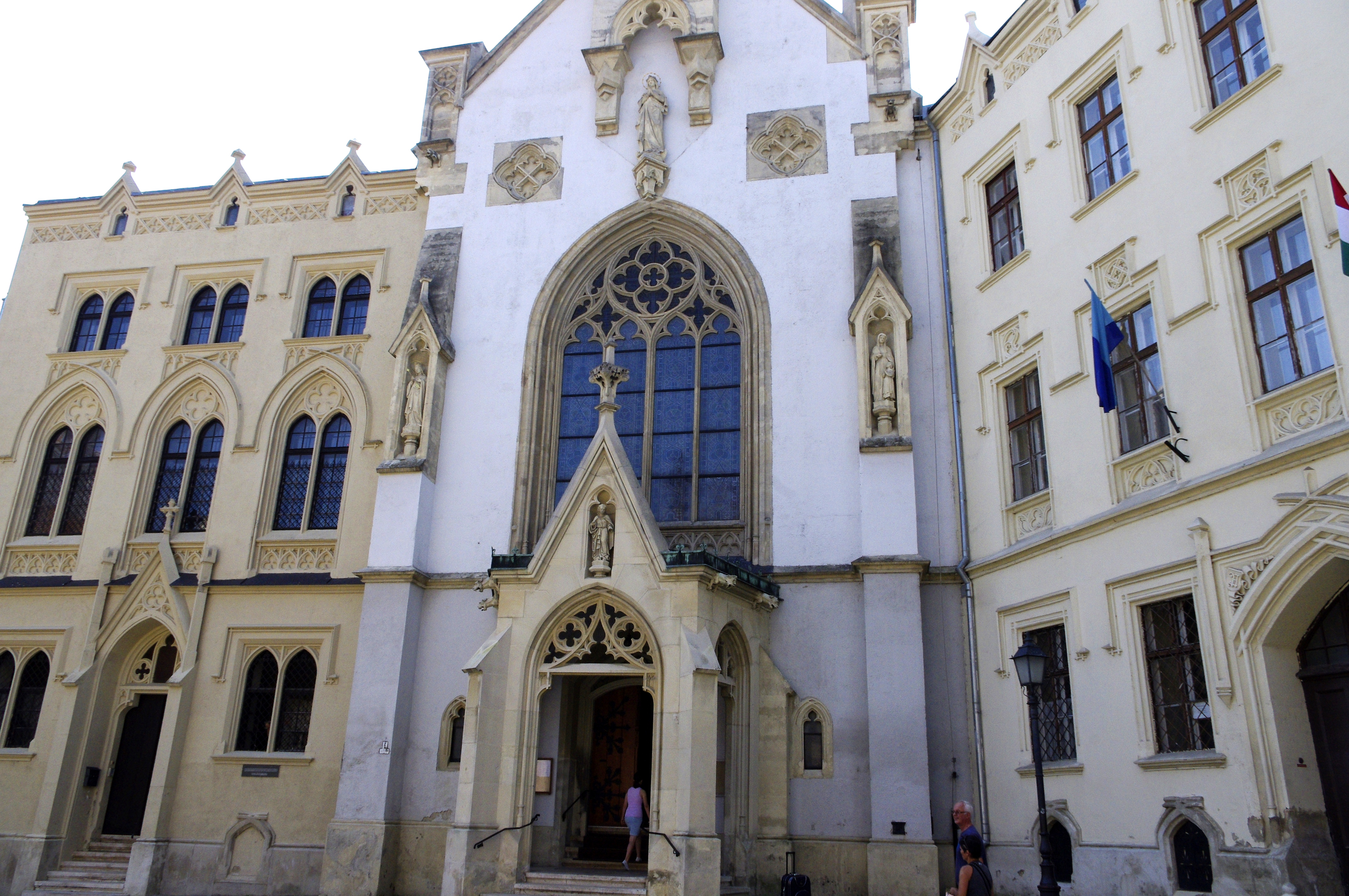 Sopron, Ungarn - Ursulakirche (Szent Orsolya templon). This is a photo of a monument in Hungary, Identifier: 4845